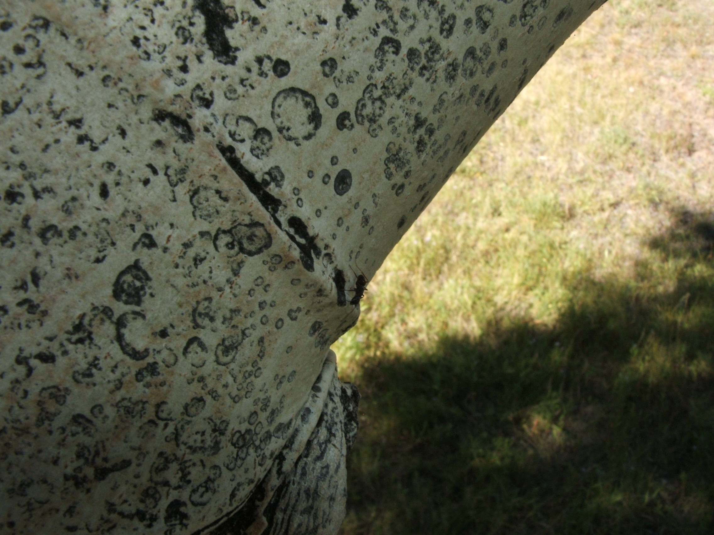 Aspen (Populus tremuloides), in Colorado.